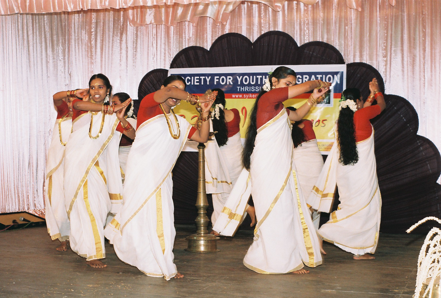 തിരുവാതിരകളി, കേരള സാഹിത്യ അക്കാദമി ഹാൾ തൃശ്ശൂർ